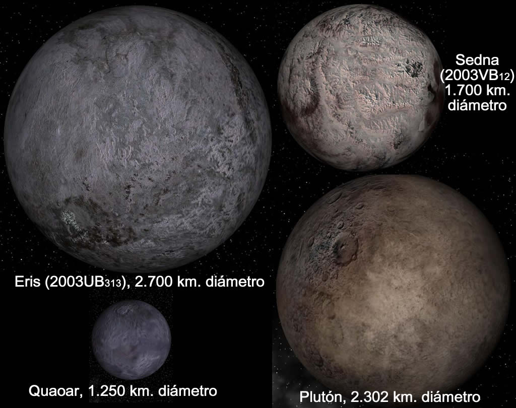 Planetas enanos